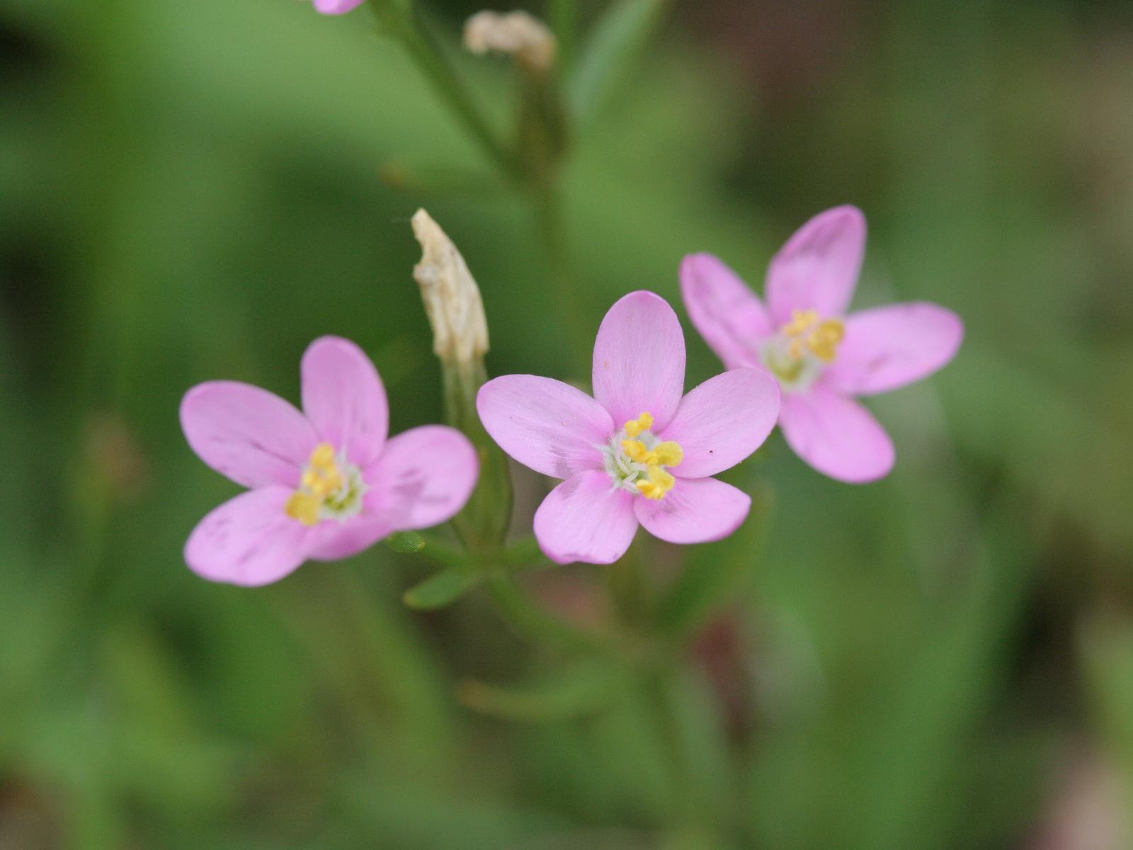 Kleines Tausendgüldenkraut (Centaurium pulchellum)